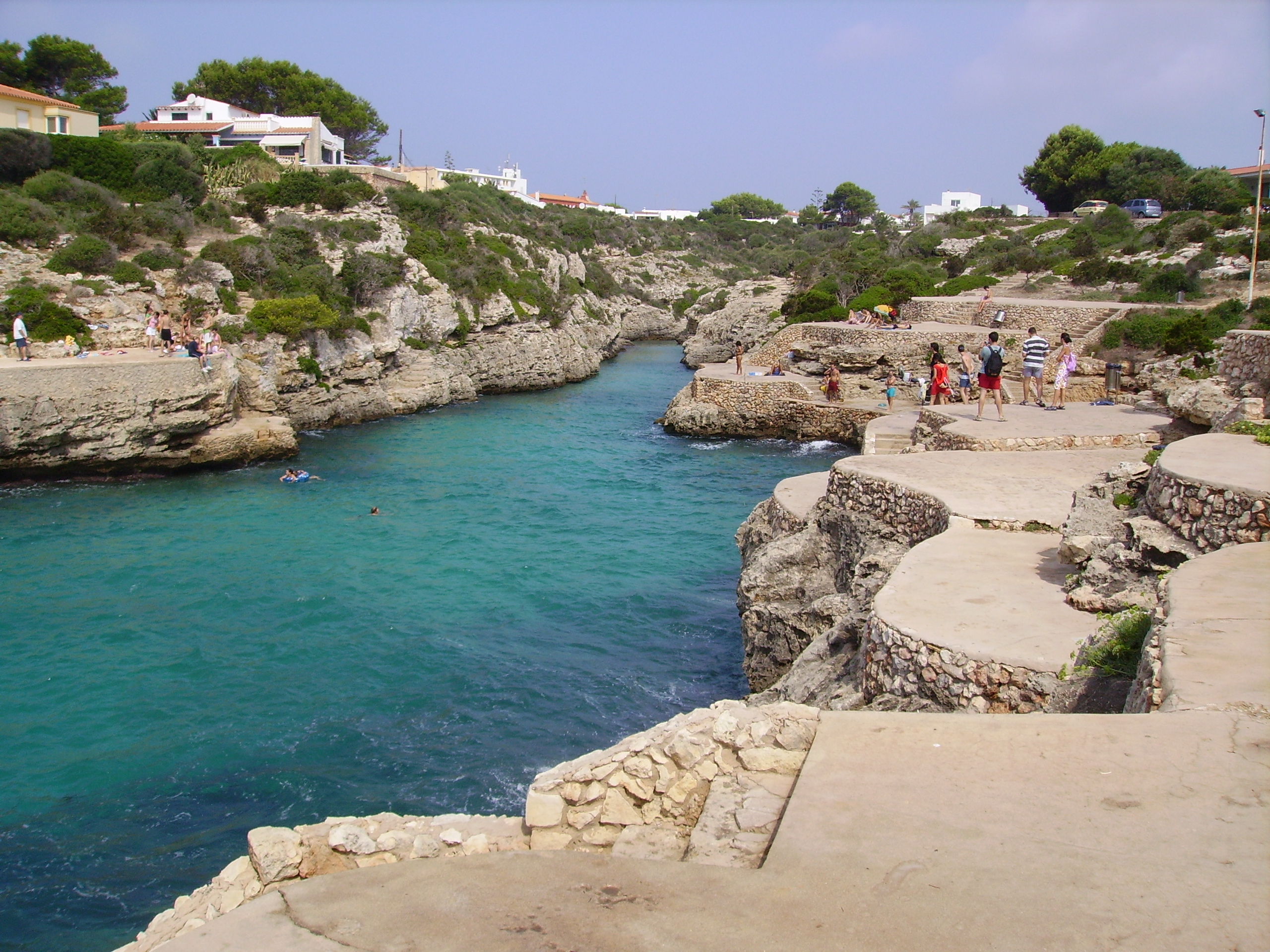 Cala'n Brut, Menorca, Illes Balears.